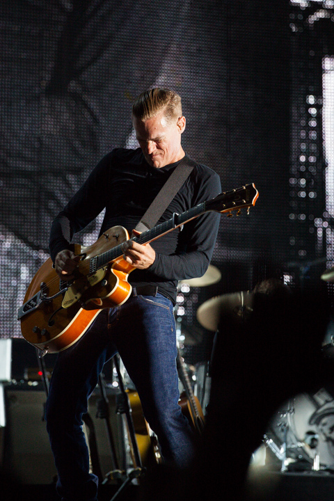 20130710-ByanAdamsLucca-0074